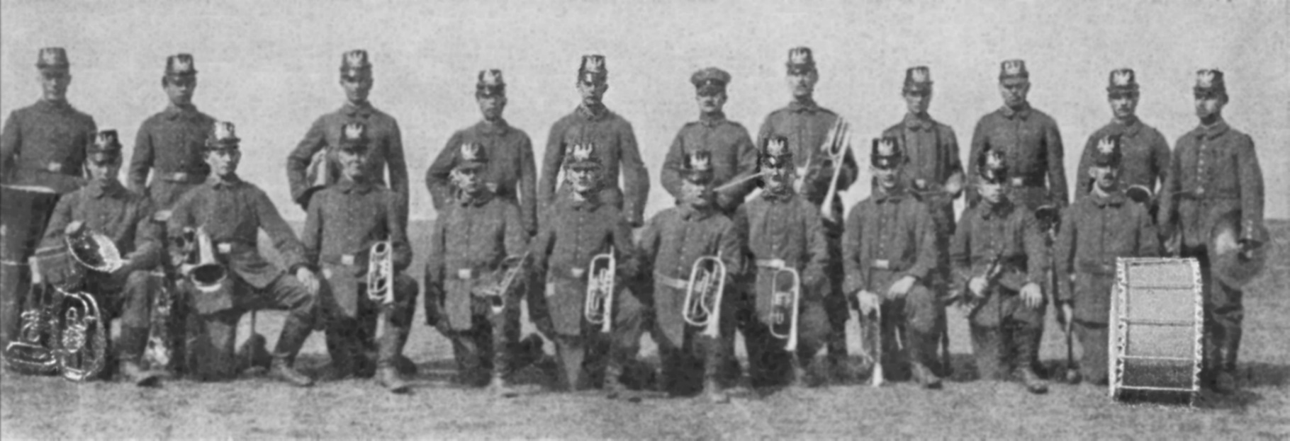 Description